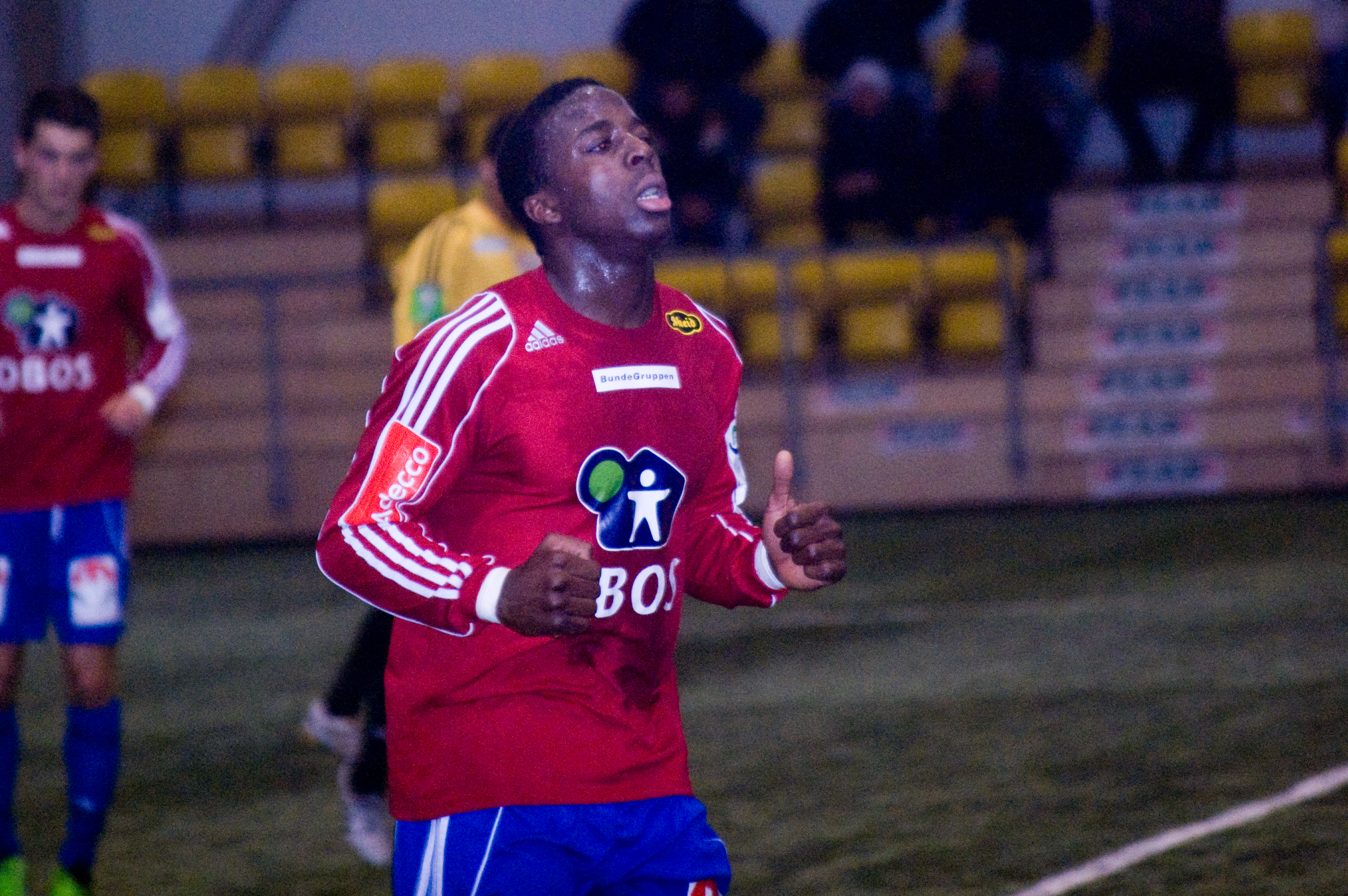 Skeid mot B�rum (1-2) i LSK-hallen 20. januar.